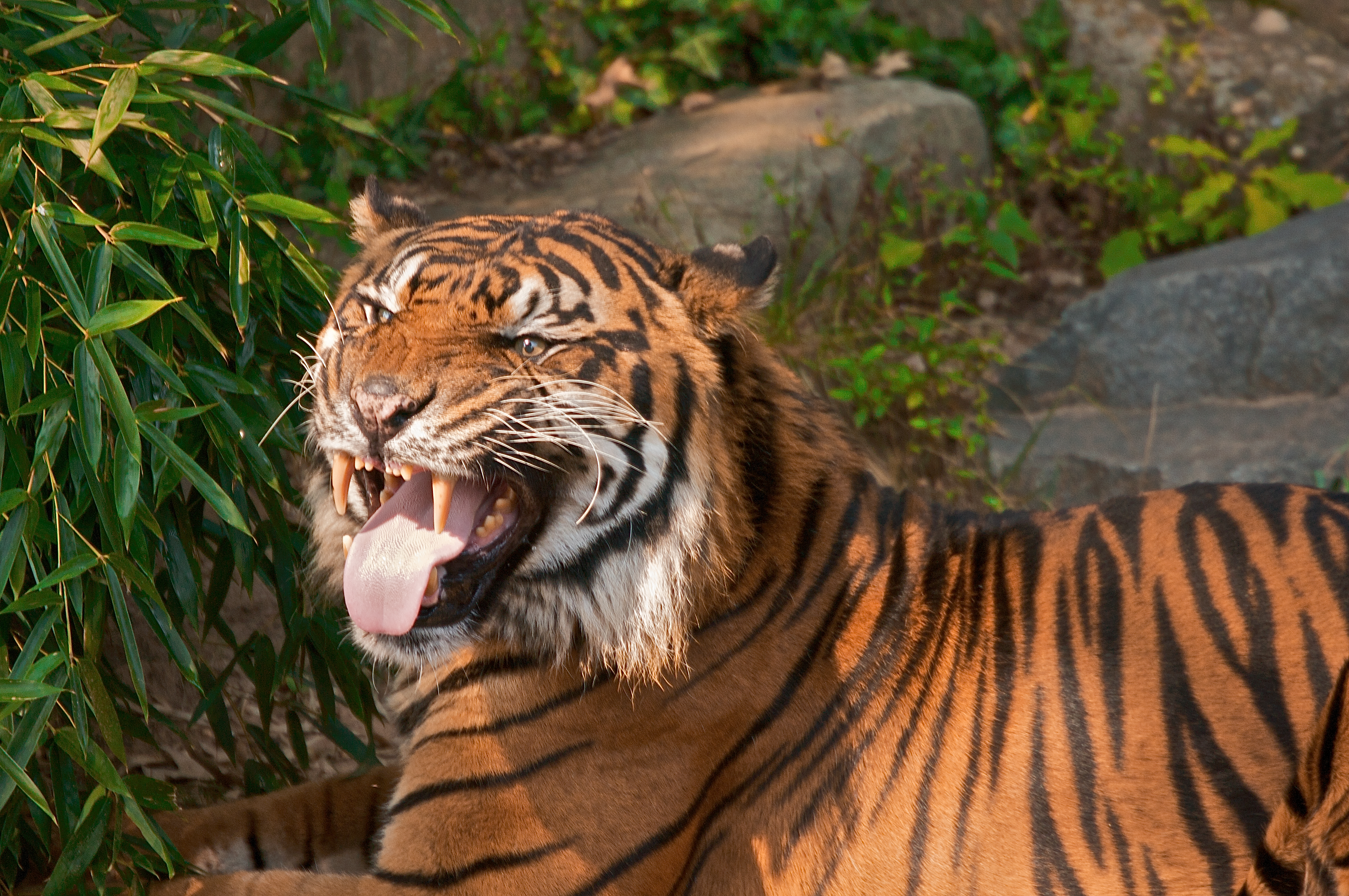 Flehmen on a tiger